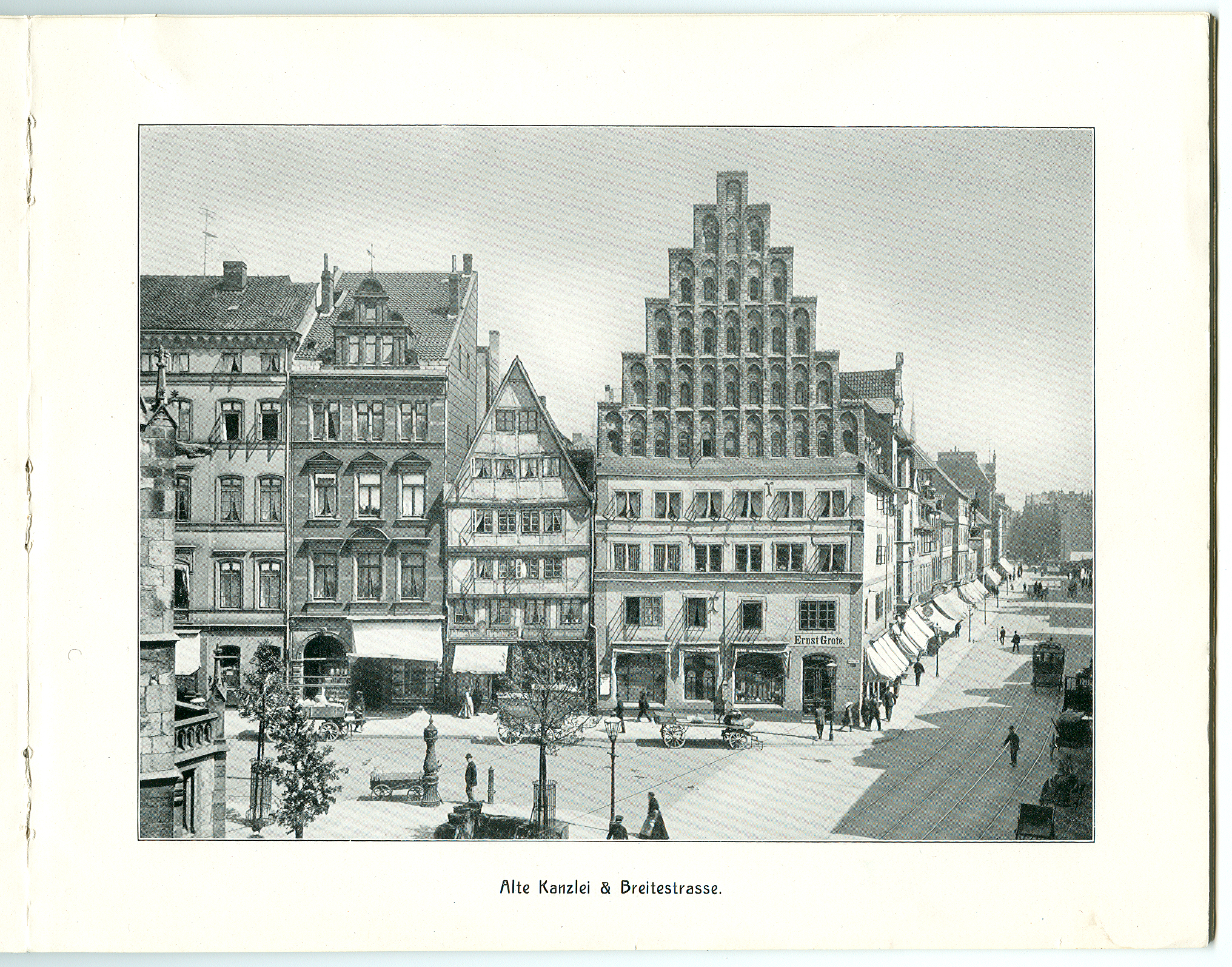 „Hannover – 26 Ansichten nach künstlerischen Aufnahmen“ von Karl F. Wunder. – Alte Kanzlei & Breitestrasse.